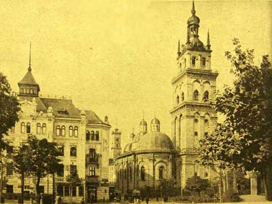 Успенська (Волоська) церква та вежа Корнякта. Фото к. ХІХ - п. ХХ ст.